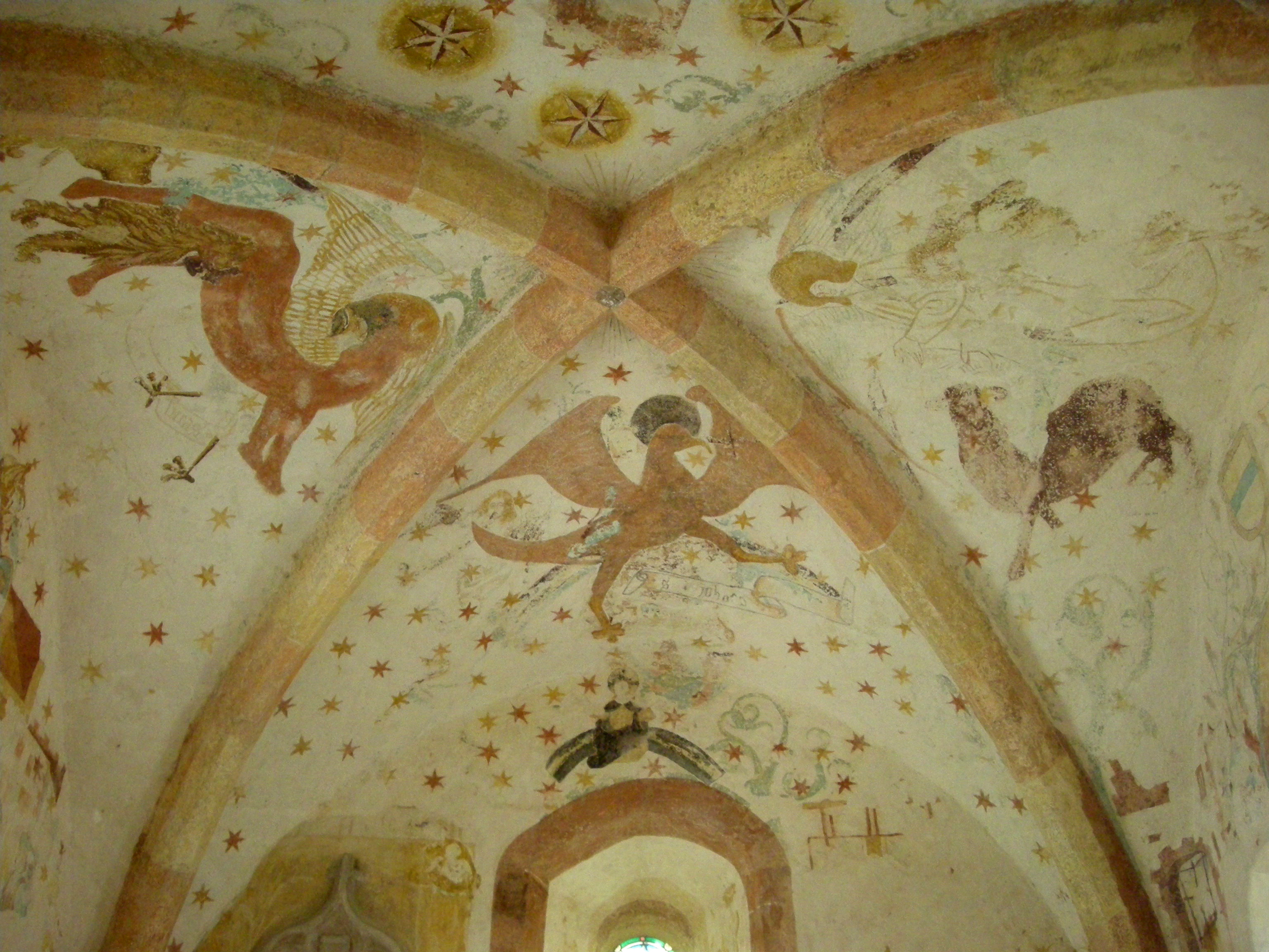 Fresques restaurées de l'église protestante de Fouday (Bas-Rhin, Alsace)